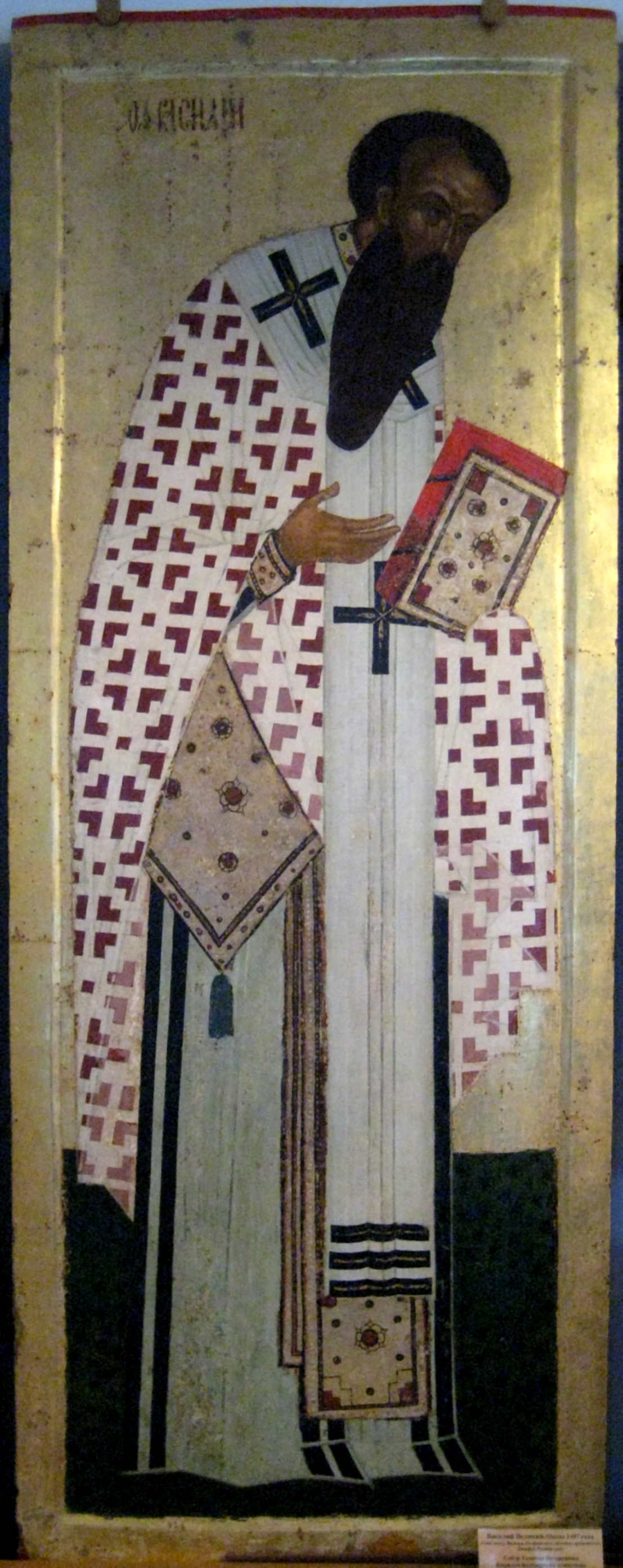 Василий Великий. Около 1497 года. "Сию икону Василия Кесарийского обложил архиепископ Досифей Ростовский". Собор Успения Богородицы, Кирилло-Белозерский монастырь